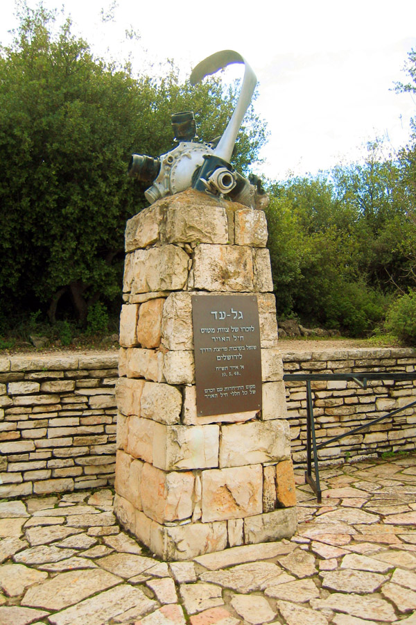 HHar Tayasim memorial